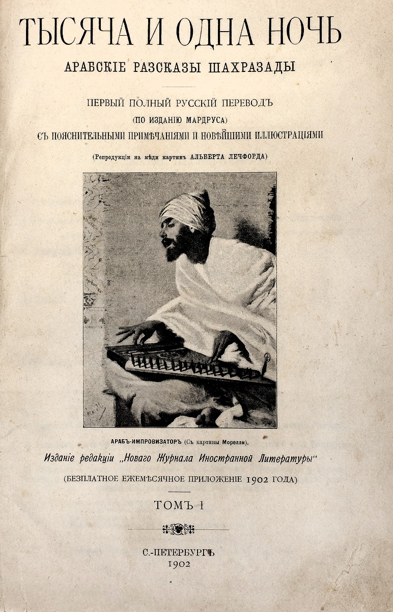 Тысяча и одна ночь. Арабскіе разсказы Шахразады. Первый полный русскій переводъ (по изданію Мардруса) съ пояснительными примѣчаніями и новѣйшими иллюстраціями (репродукціи на мѣди картинъ Альберта Лечфорда). Изданіе редакціи "Новаго Журнала Иностранной Литературы". Томъ 1. С.-Петербургъ 1902.